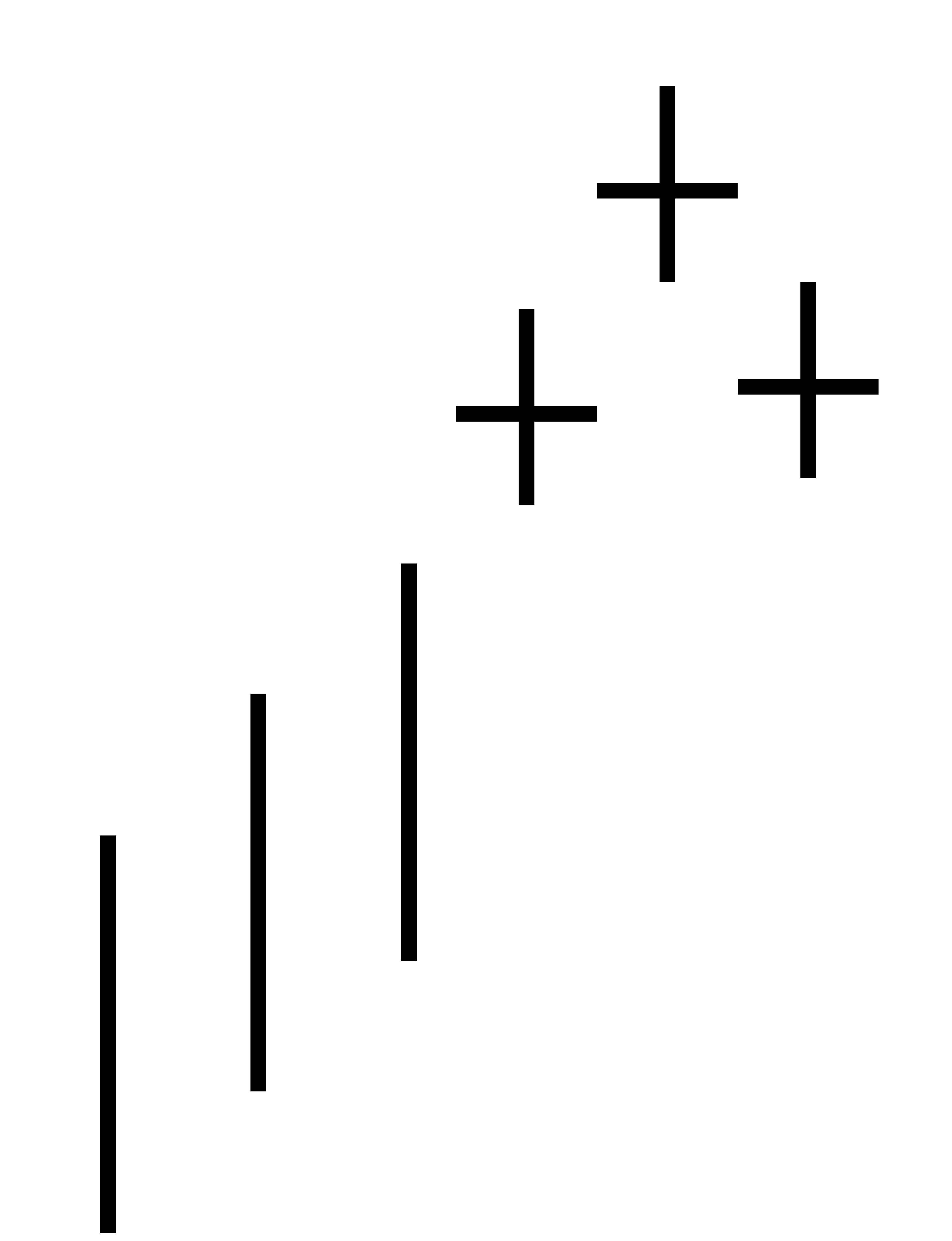 Doji Star